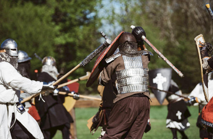 Mitglieder der Society for Creative Anachronism bei einer Schlacht im SCA-Kampfsystem.